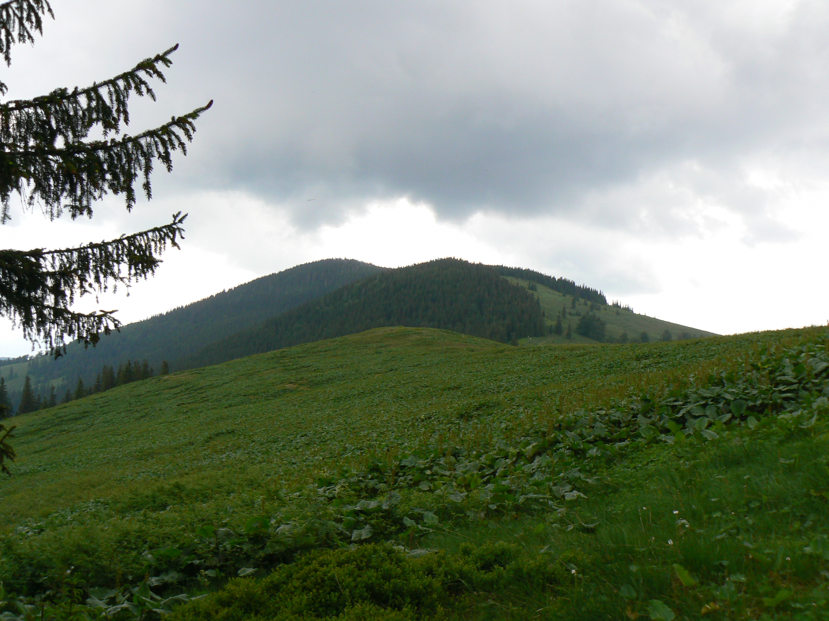 Romanka widziana z Hali Pawlusiej